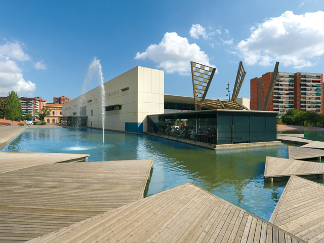 Edifici de Barcelona BCNord